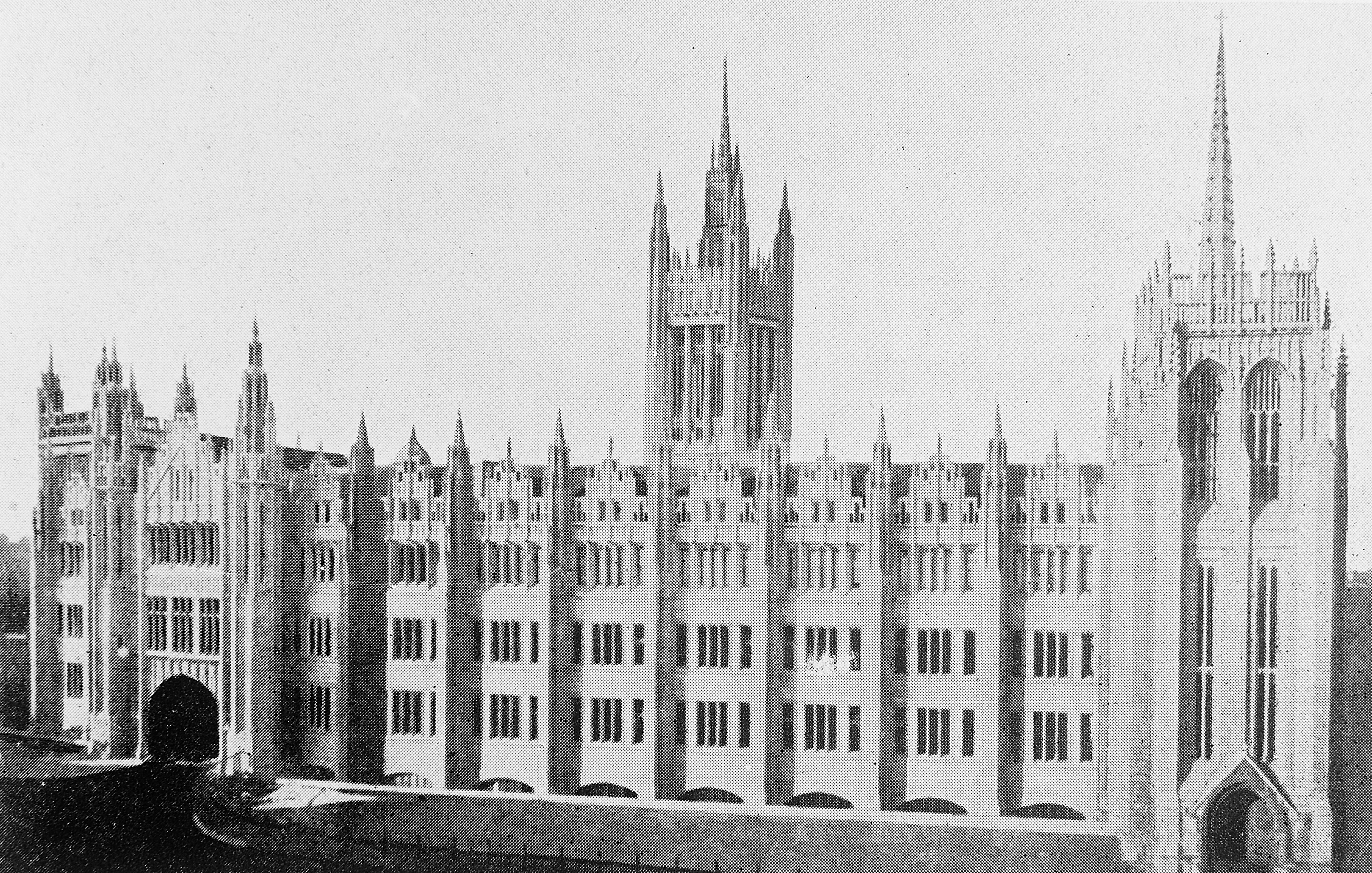 Aberdeen, Marischal College, exterior Wellcome Images Keywords: Scotland; aberdeen